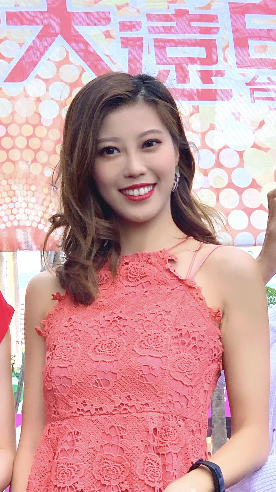 Amis L.艾蜜絲 2019寫真桌曆簽名見面會 台中場 拍攝地點：台中大遠百 日期：2018／12／08 拍攝器材：iPhone XS Max